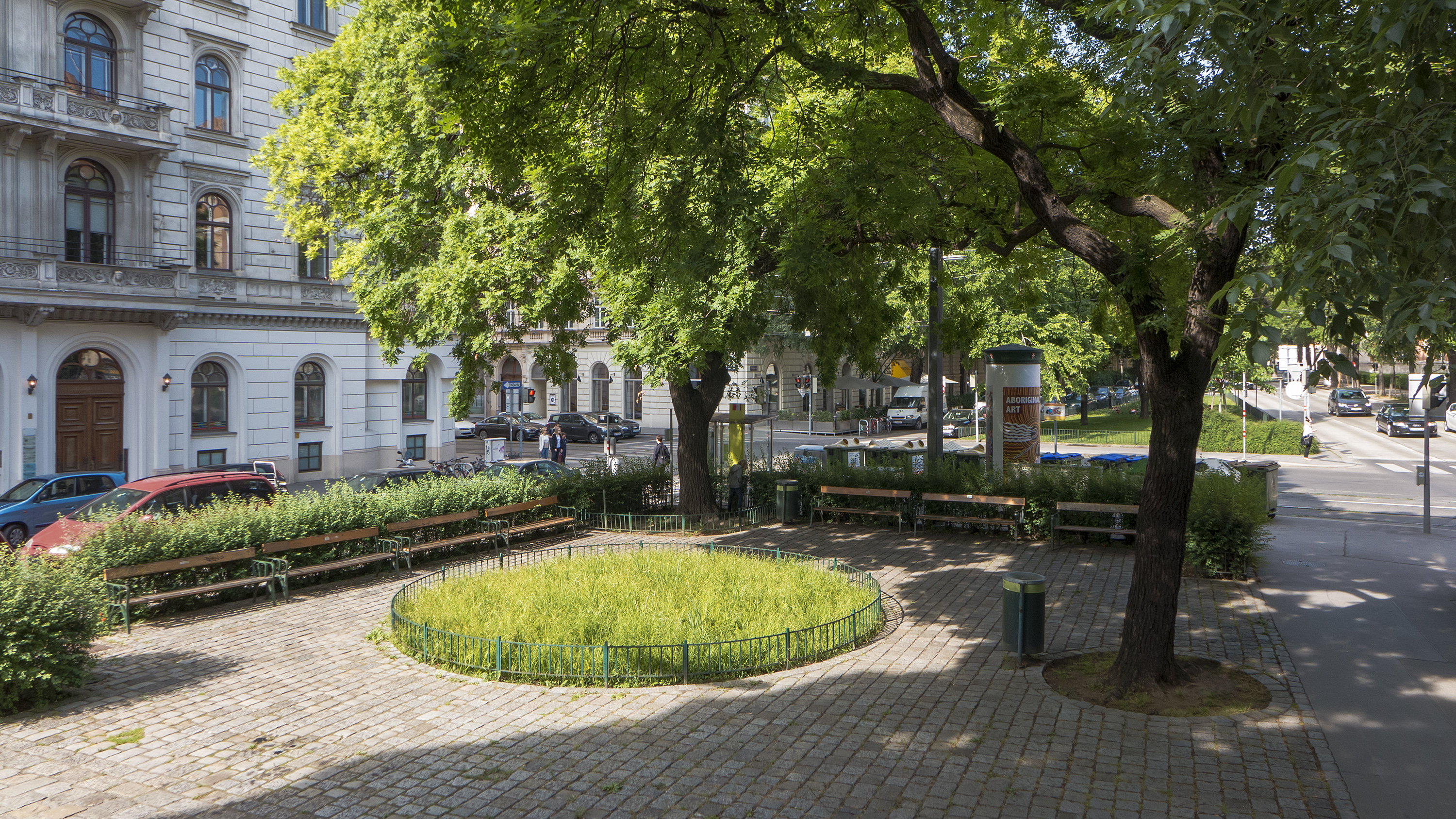 Schlickplatz in Wien 9 bei der Türkenstraße Richtung Nordosten